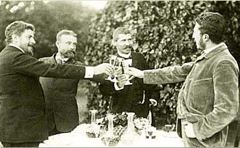 Från vänster: Oscar Björk, Teodor Lundberg, Carl Möller och Prins Eugen 1891